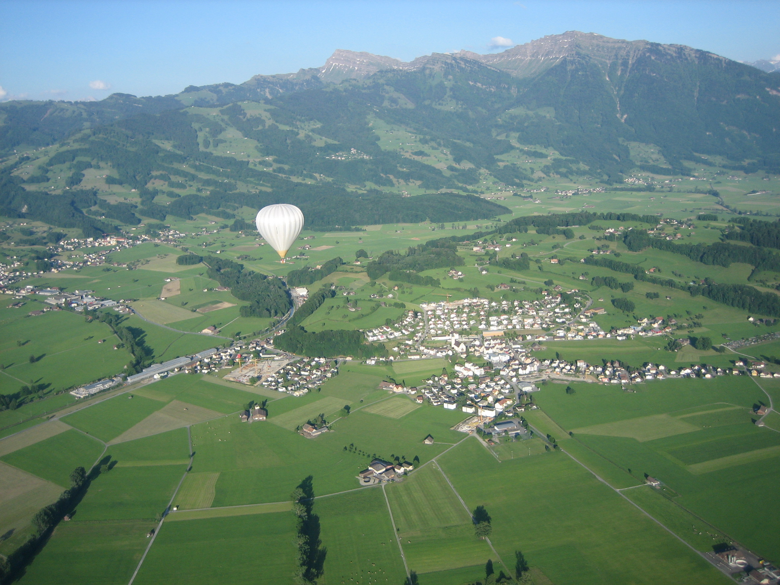 Benken SG aus dem Flugzeug (rechts der Benkner Büchel, im Hintergrund der Speer und der Federispitz)